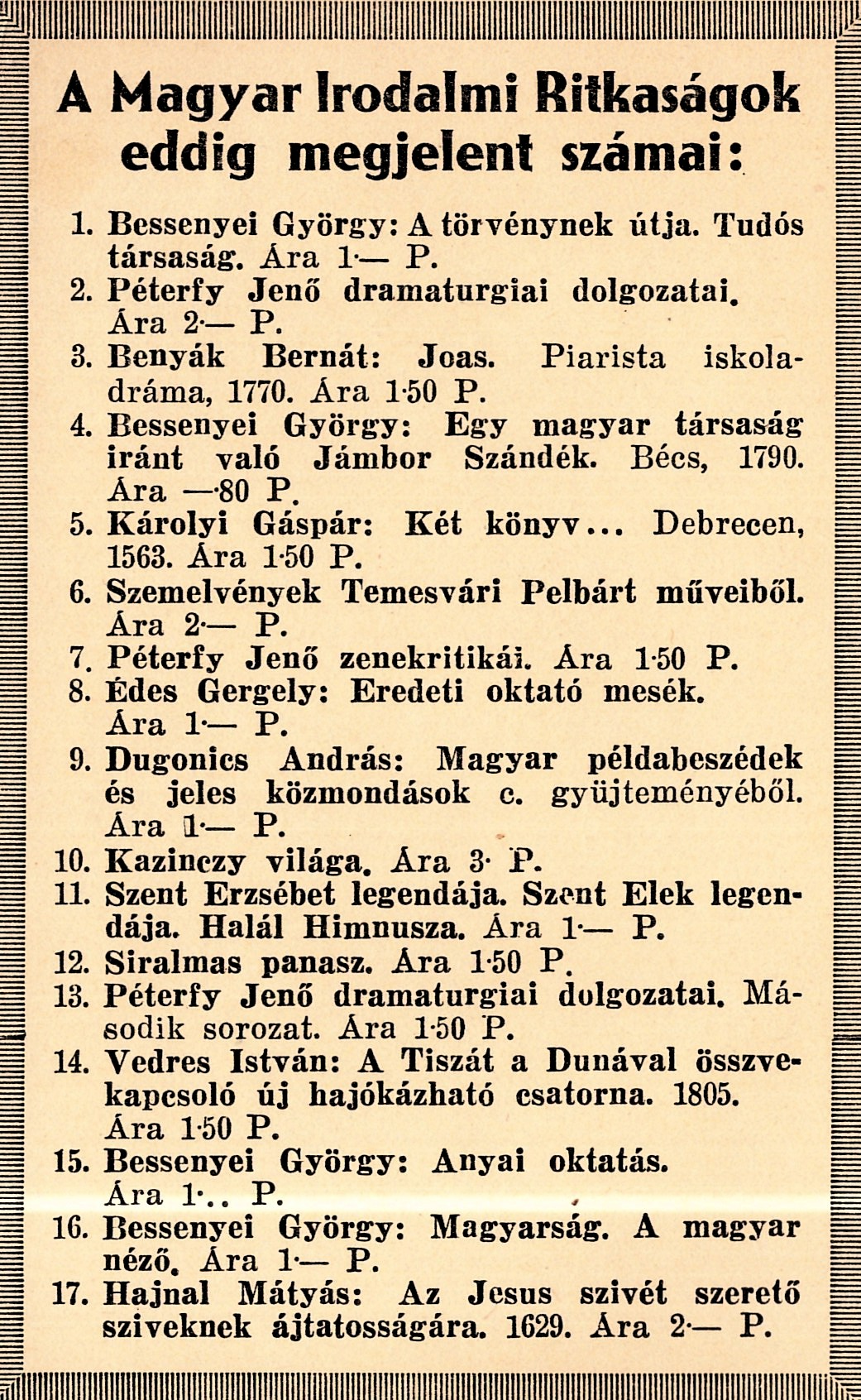 Magyar irodalmi ritkaságok, korabeli hirdetés, szerző nem ismert, 1930-as évek